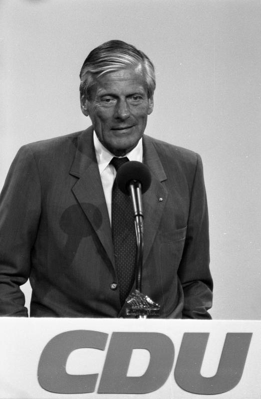 11.-13.9.1989 37. Bundesparteitag der CDU in der Bremer Stadthalle